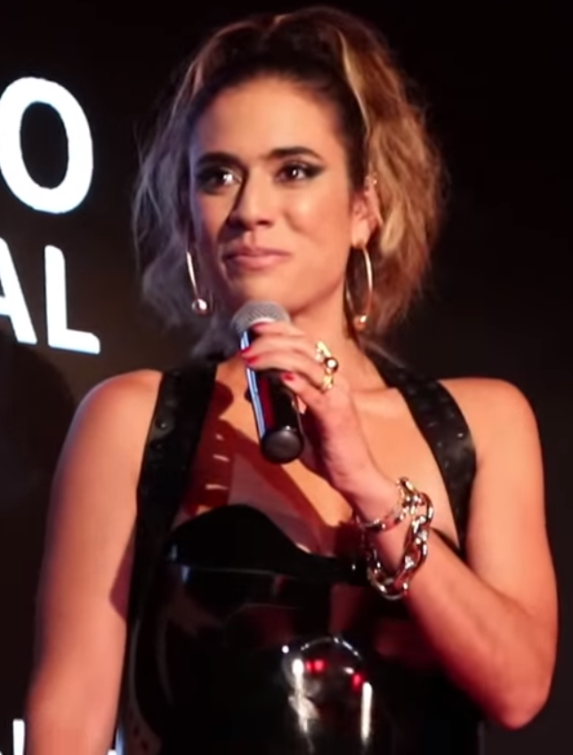 Carolina Ramírez en lanzamiento internacional de La Reina del Flow para Telemundo Internacional